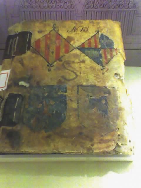 Coberta de l'edició del llibre del Consolat de Mar, editat a Ciutat de Mallorca el 1320, on s'aprecien els escuts dels regnes de la Corona Catalana : Catalunya, Mallorca, Aragó i Sicilia.